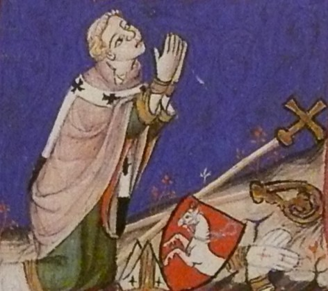 Arnost z Pardubic